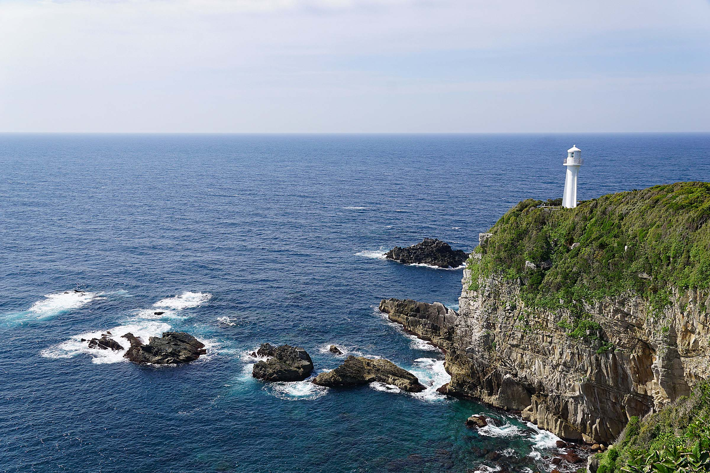 Cape Ashizuri / 足摺岬